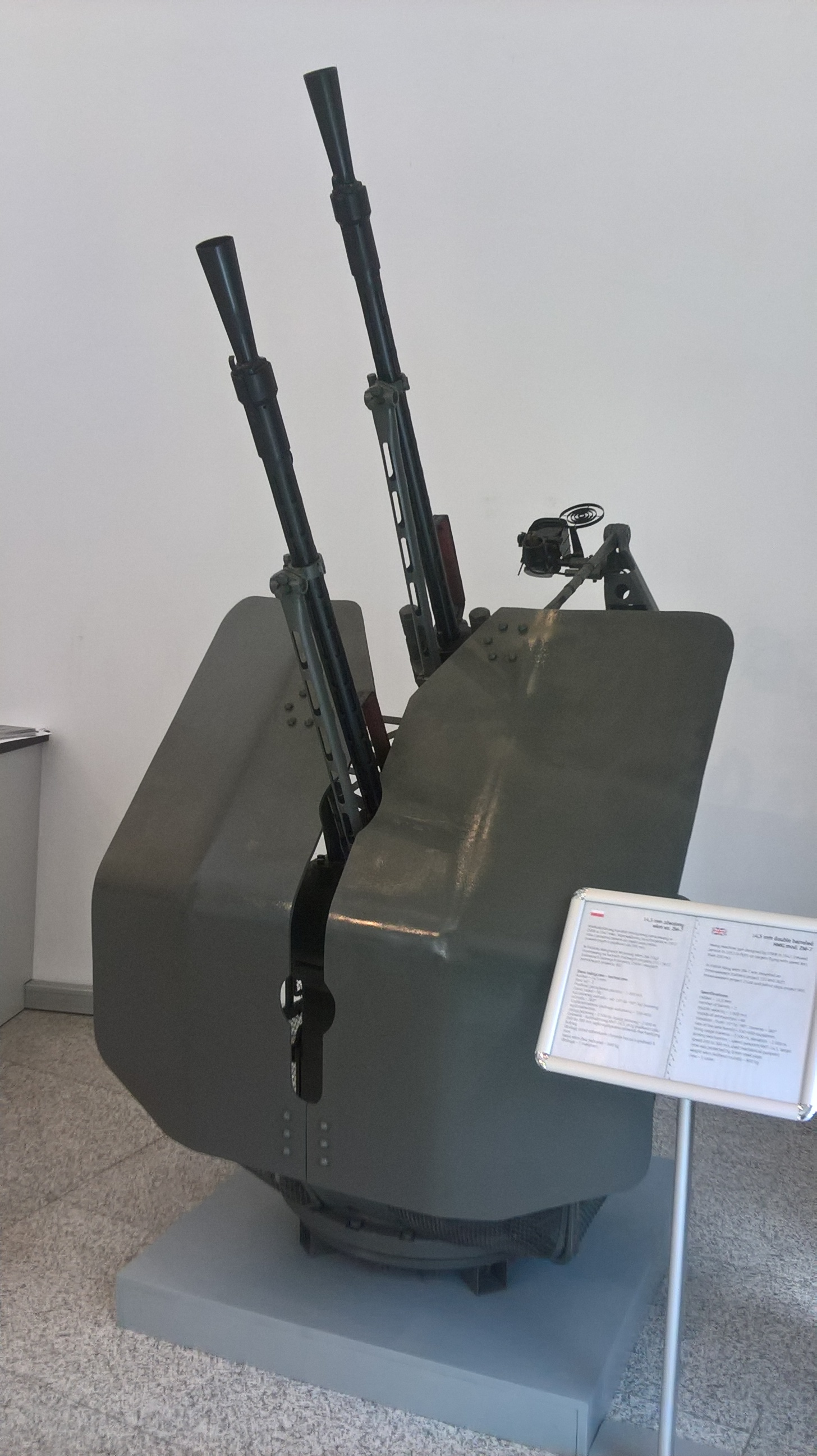 Zestaw 2M-7 kal. 14,5 mm eksponowany w Muzeum Marynarki Wojennej w Gdyni.